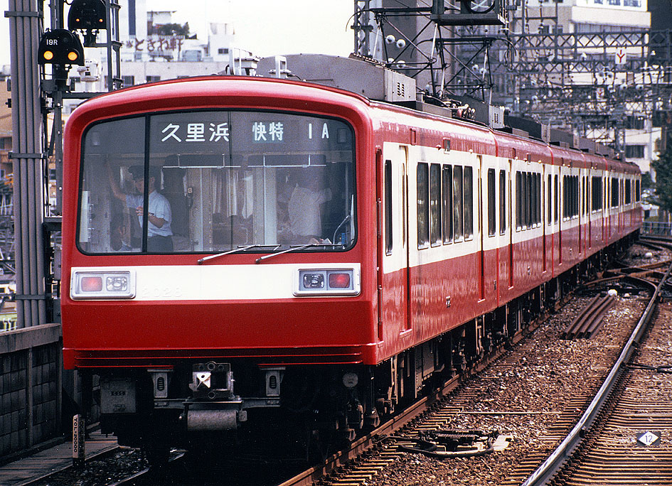 京浜急行 2000形 2028 快速特急